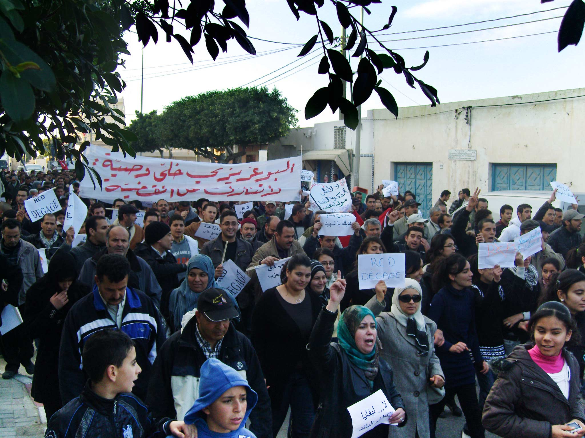 Manifestation organisée par l'Union générale tunisienne du travail, contre le Rassemblement constitutionnel démocratique.